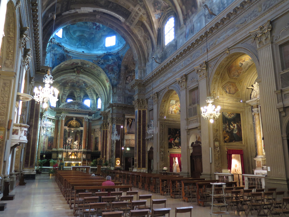 Chiesa di San Paolo Maggiore This is a photo of a monument which is part of cultural heritage of Italy.